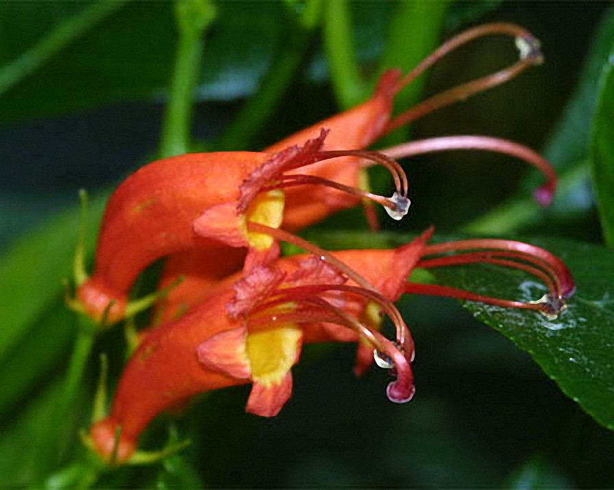 Gesneria venticosa